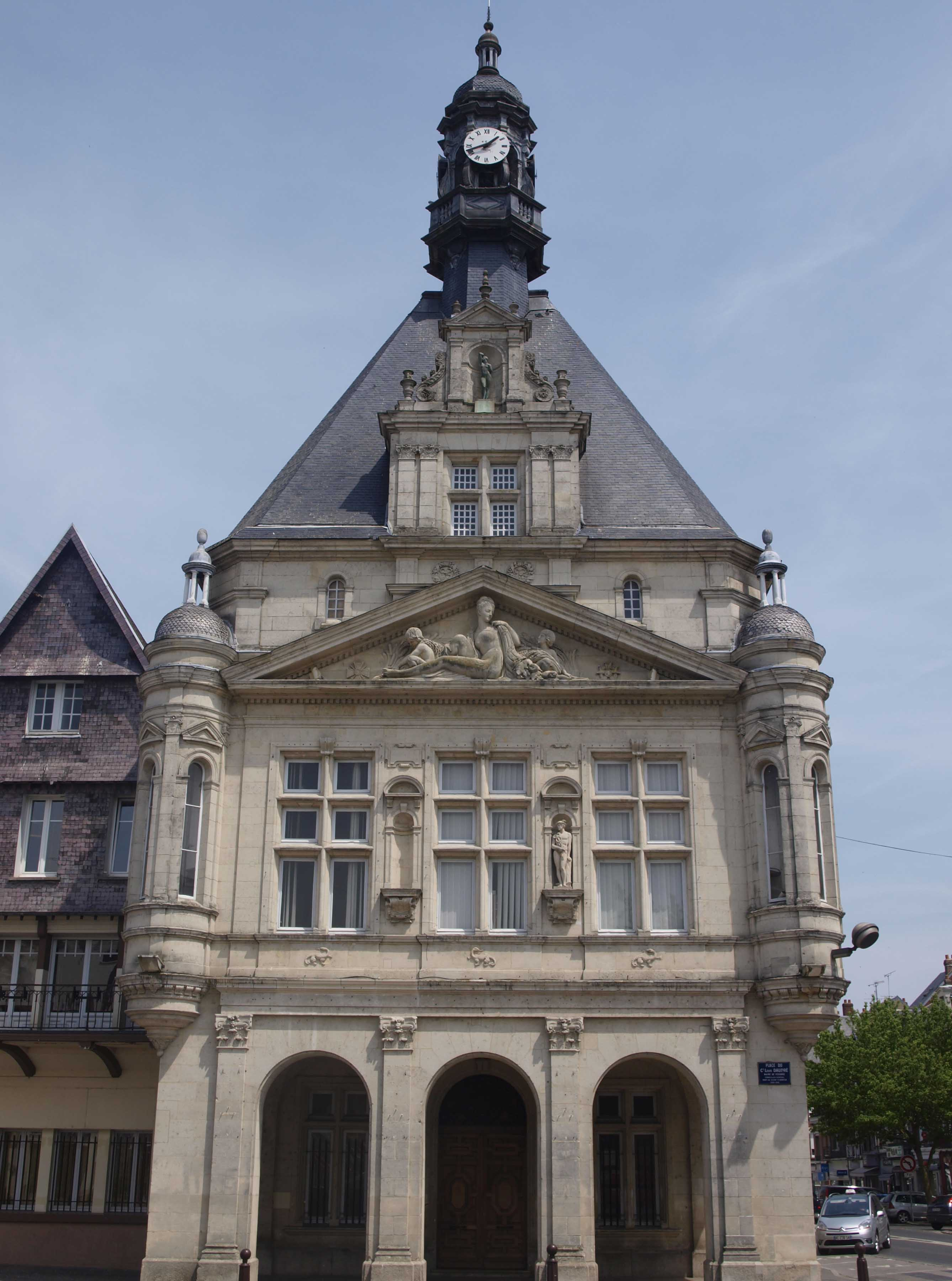 Façade renaissance sur la place Daudré